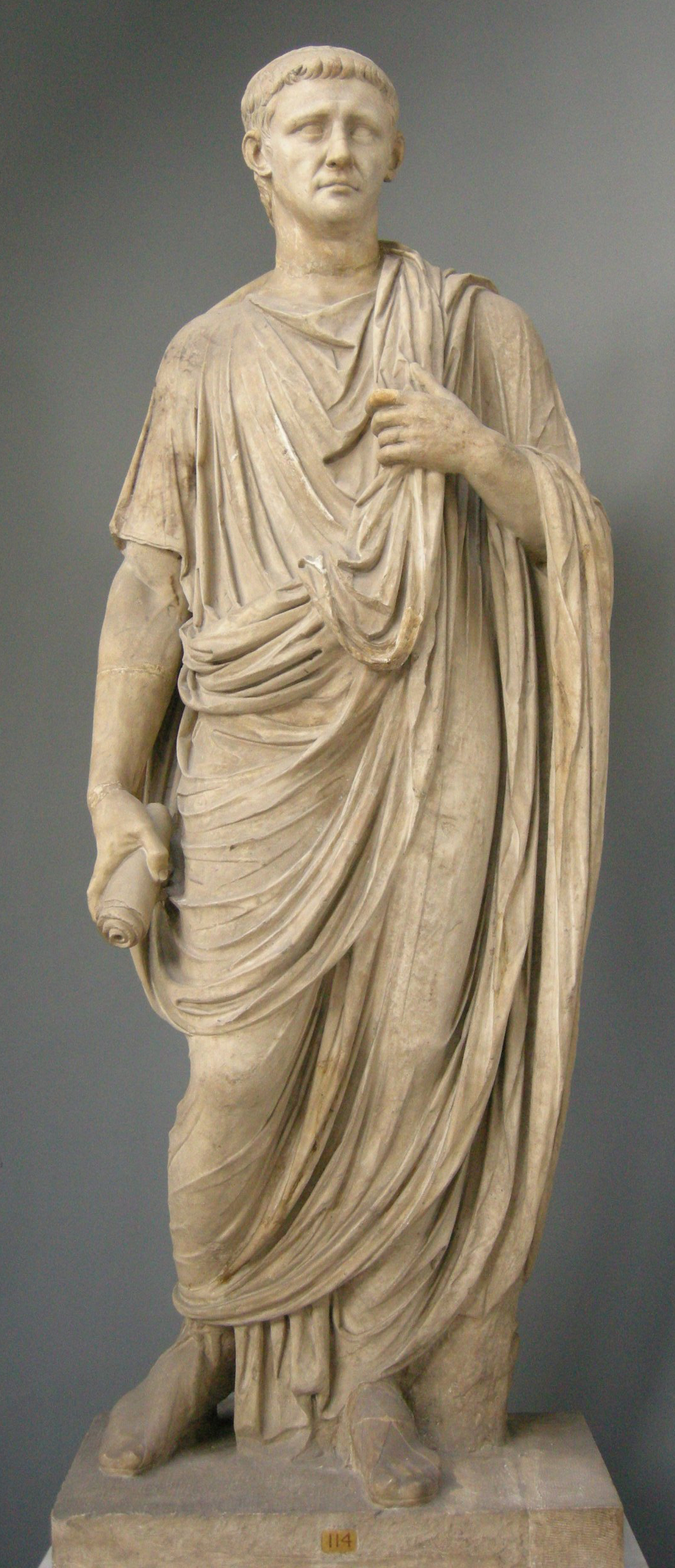 Togato con testa dell'imperatore claudio, inv. 2221.JPG